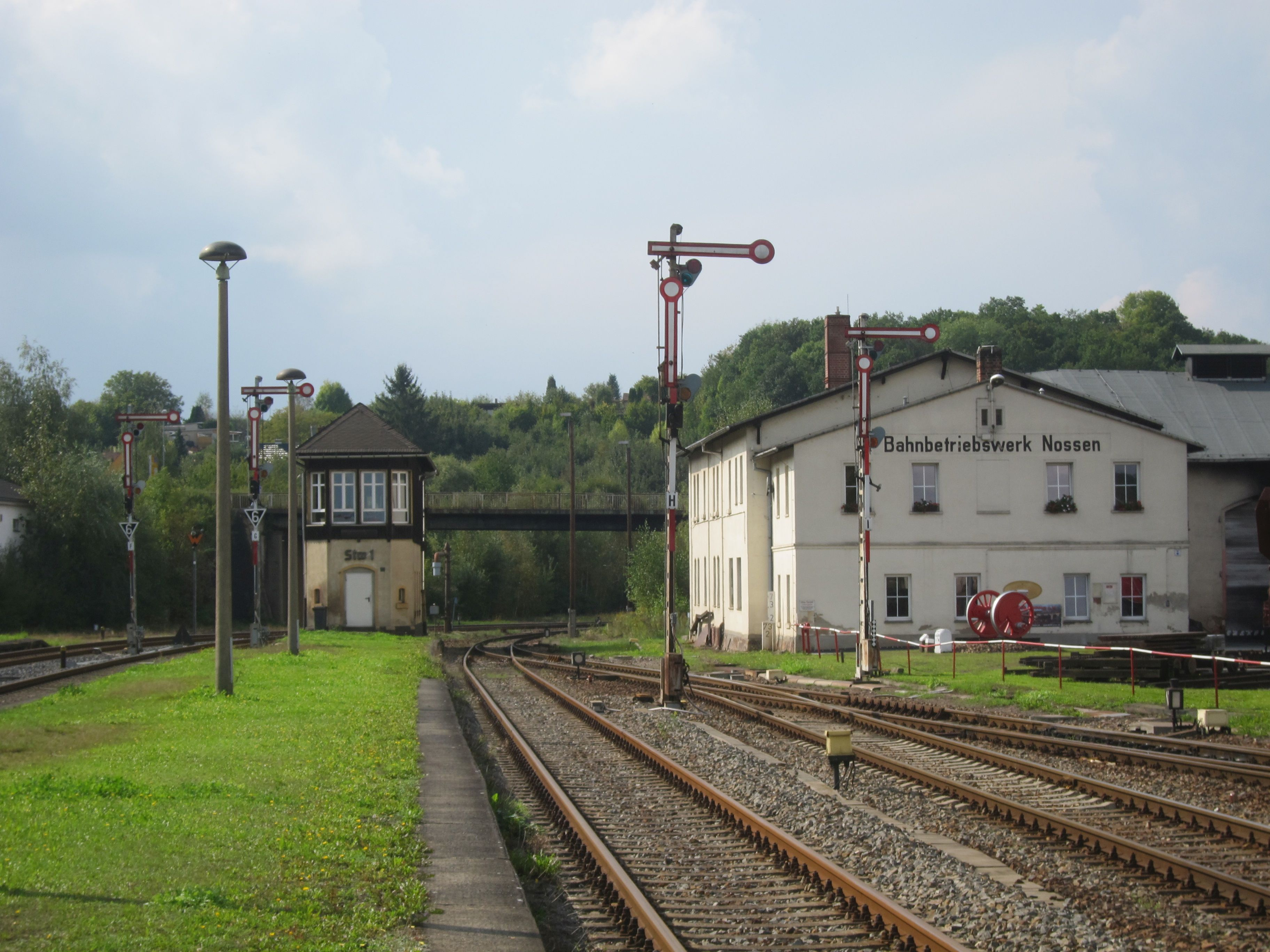 Bahnhof Nossen, Stellwerk am Westkopf des Bahnhofs und Gebäude des Bahnbetriebswerks